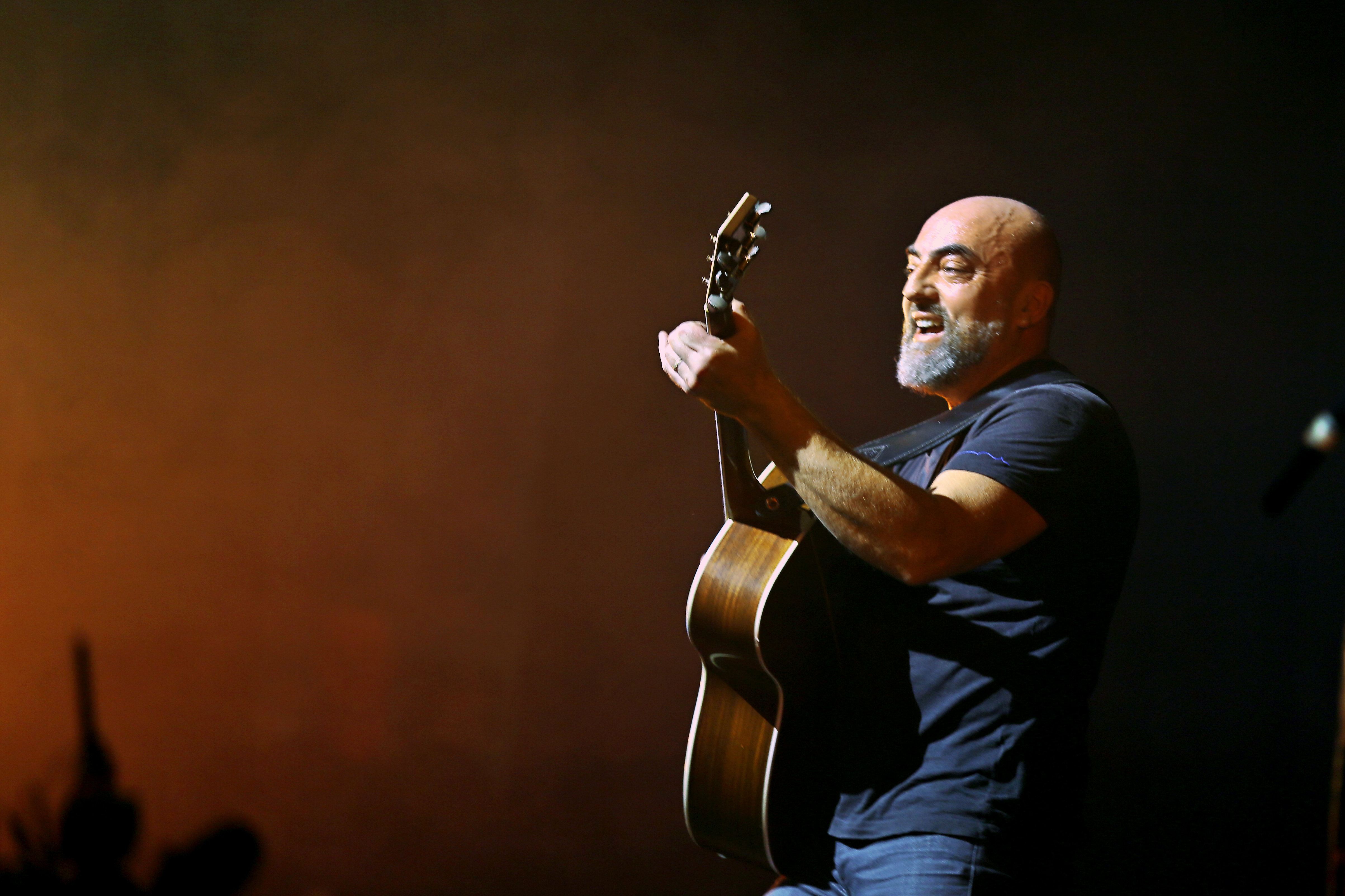 Jean-Charles Guichen présente son 2e « solo de l’Ankou » en fest-noz lors du festival Yaouank le 21 novembre 2015 au Parc des Expositions de Rennes.